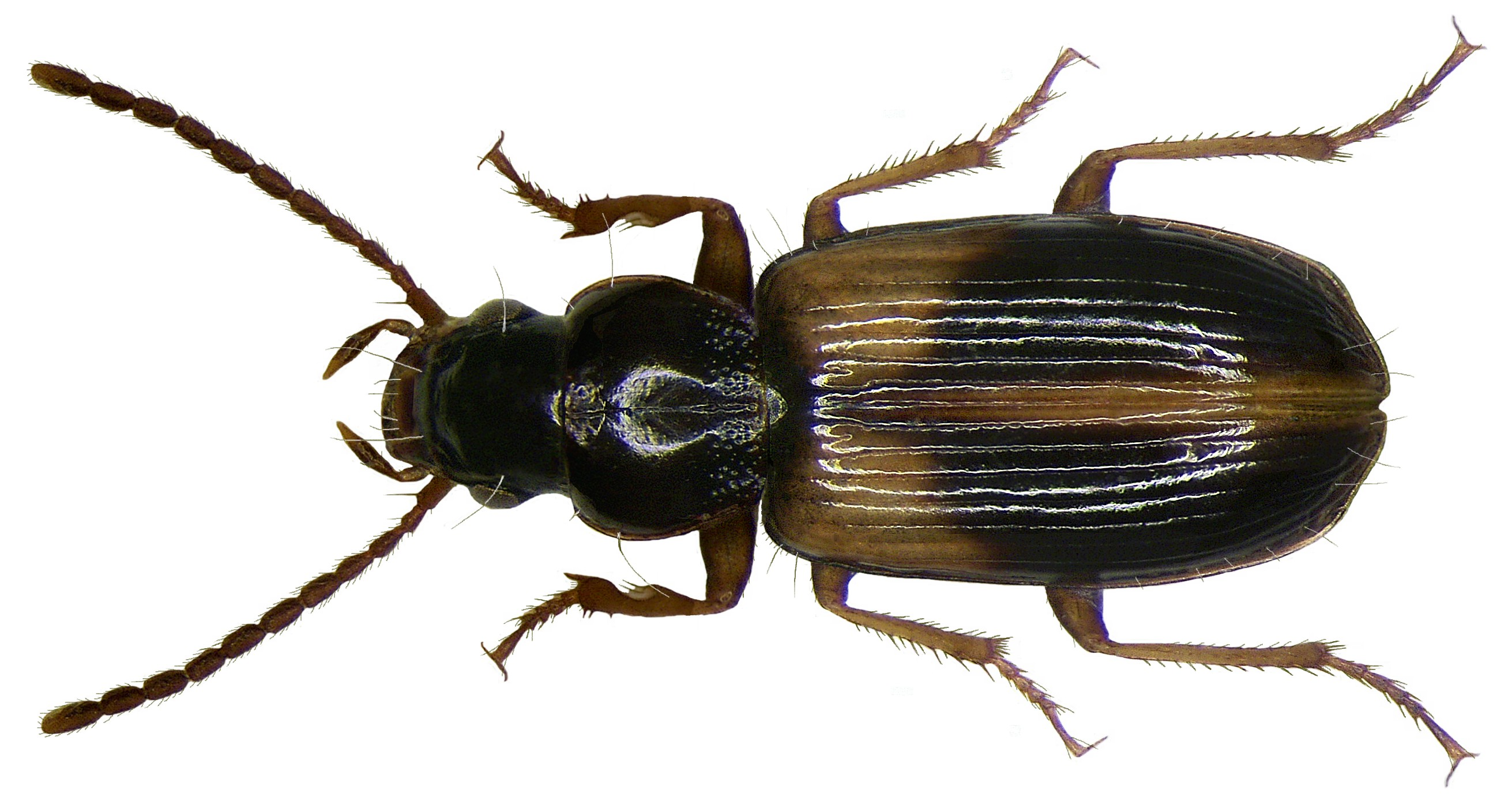 Familie: Carabidae Größe: 3-4 mm Verbreitung: Ost-, West-und Mitteleuropa, Sibirien, Mittelasien, Iran, Kleinasien, Balkan, Iberische Halbinsel, Italien, eingeschleppt in Nordamerika Ökologie: nicht an Gewässer gebunden, meist an trockeneren Stellen Fundort: Germania, Oberfranken, Kulmbach leg.det. U.Schmidt, 1993 Foto: U.Schmidt, 2008